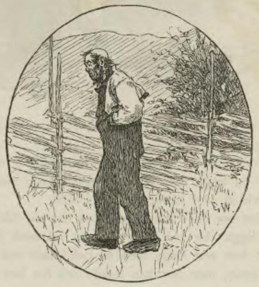 Sagobok för barn